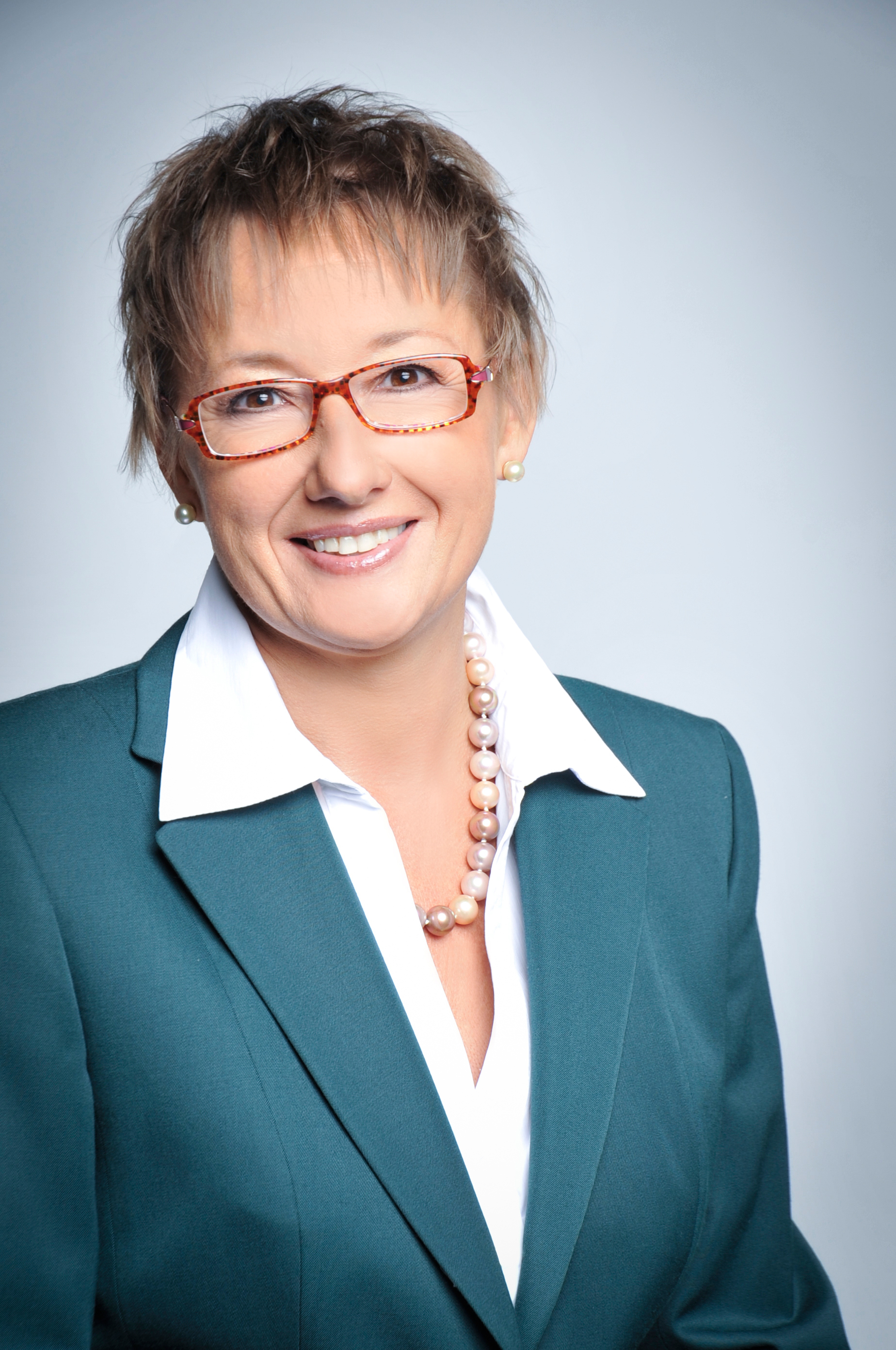 Foto von Gabriele Janssen